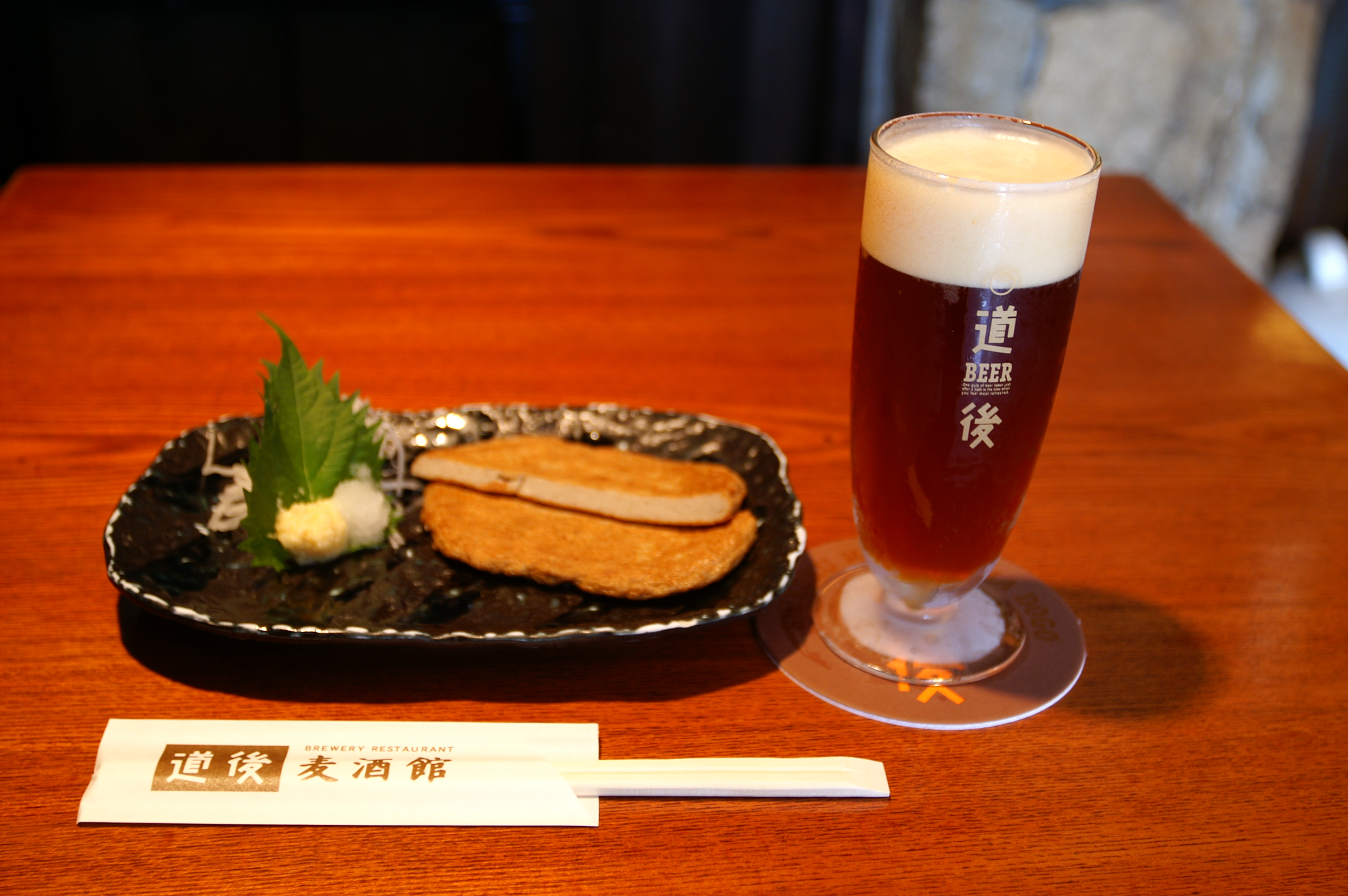 アルトタイプの道後ビール「マドンナ」と「じゃこ天」 (2006/08/23 Dogo Onsen, Matsuyama, Ehime, JAPAN)